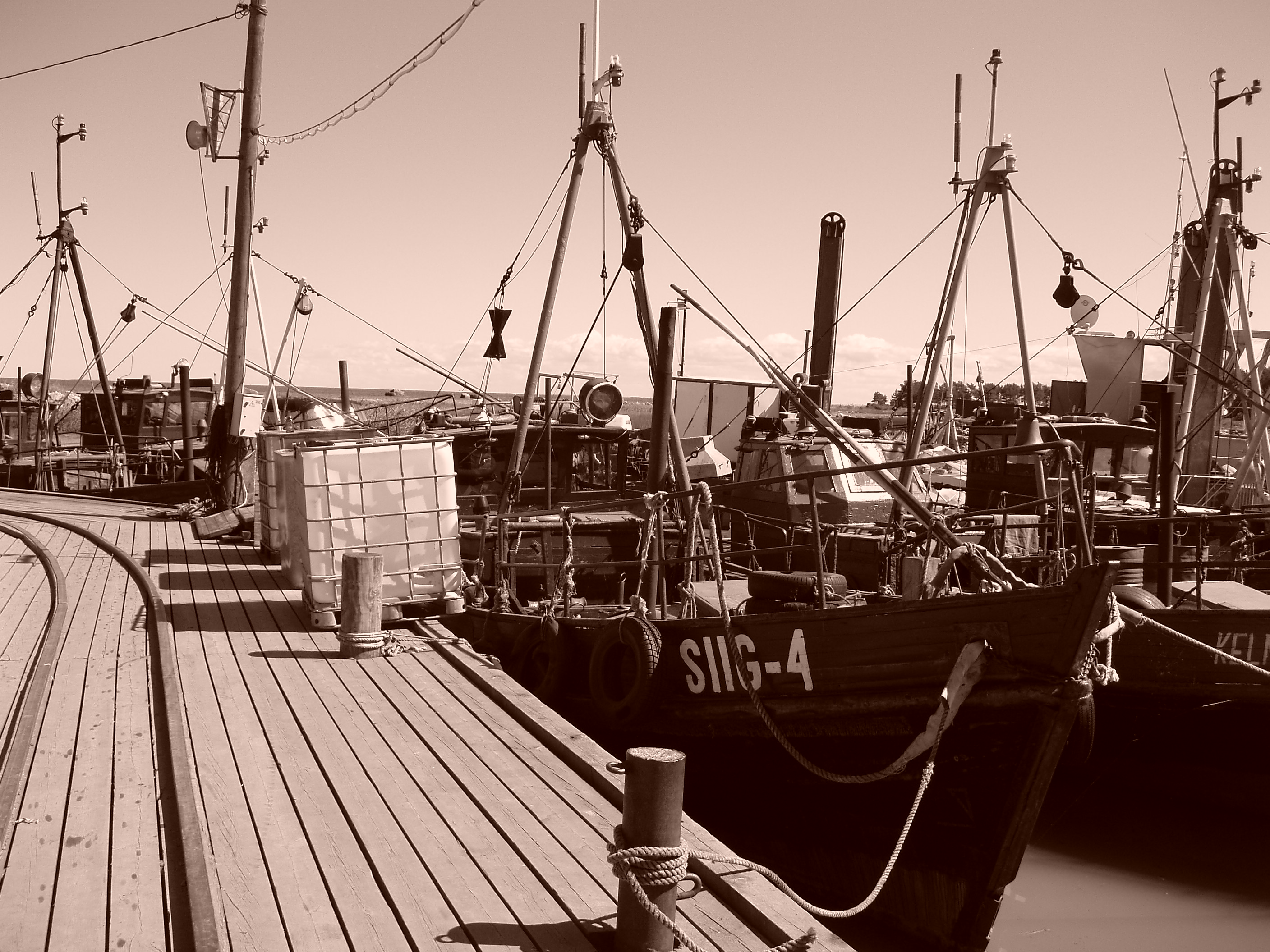 Kalalaevad Kelnase sadamas